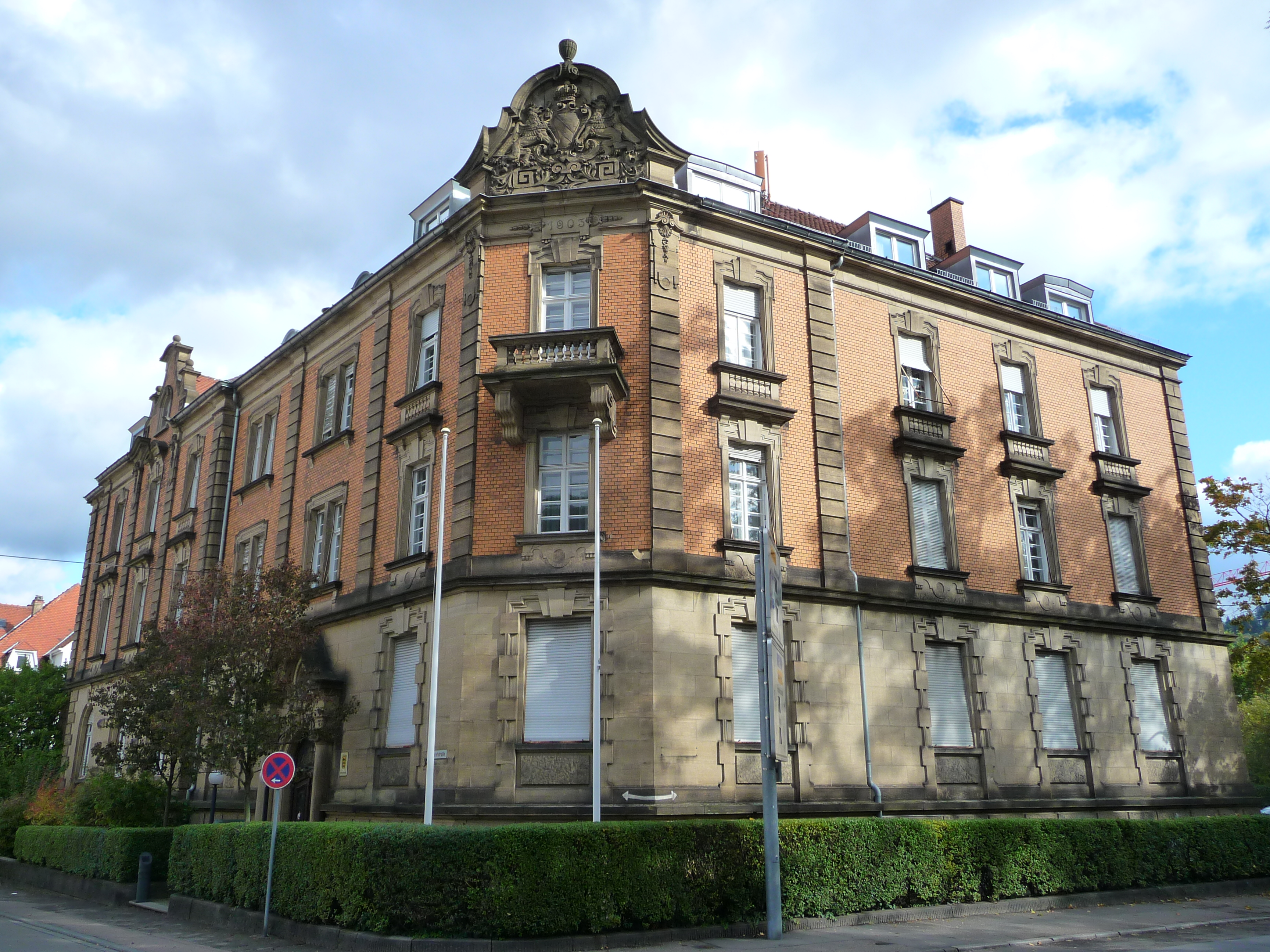 Amtsgericht Weinheim (Rhein-Neckar-Kreis, Baden-Württemberg, Deutschland)